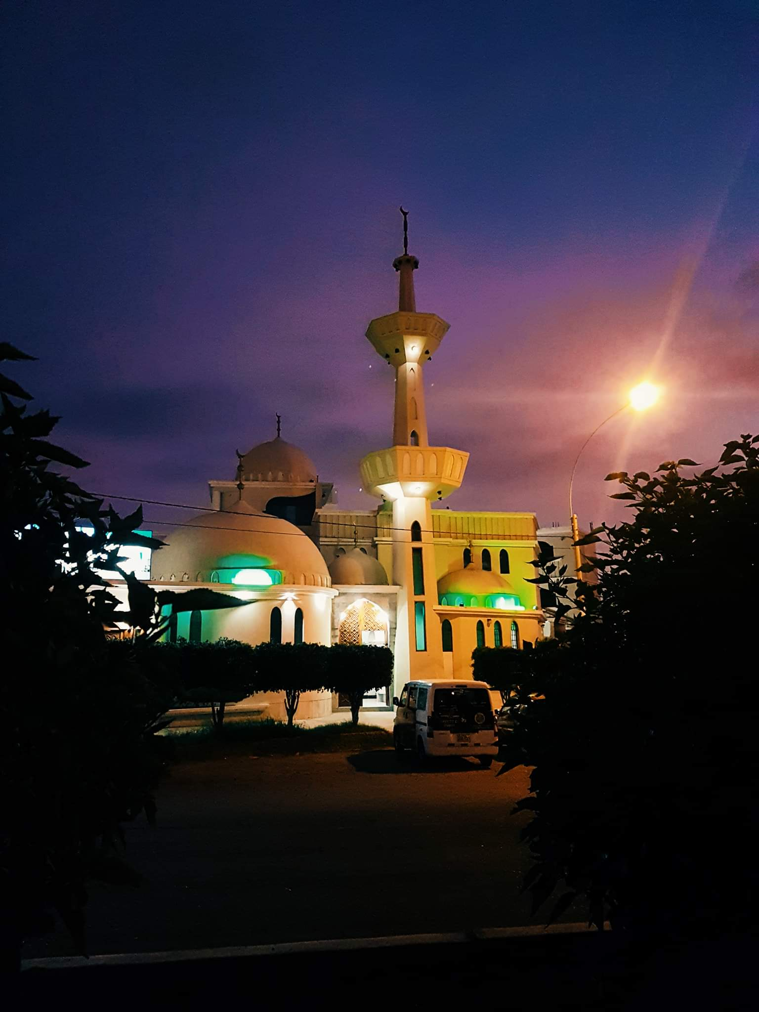 Mezquita Bab Ul Islam